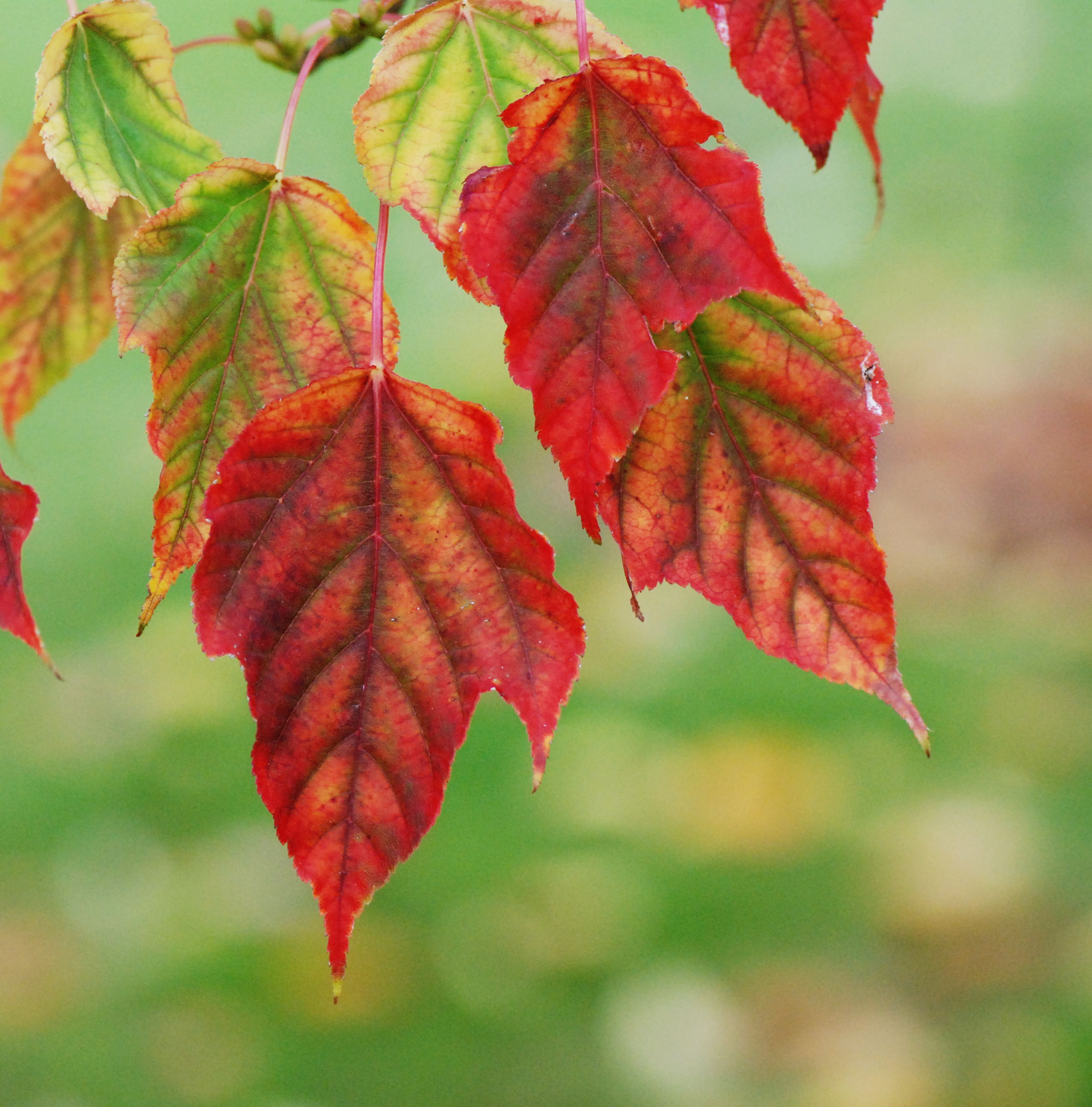 Parc floral, Paris